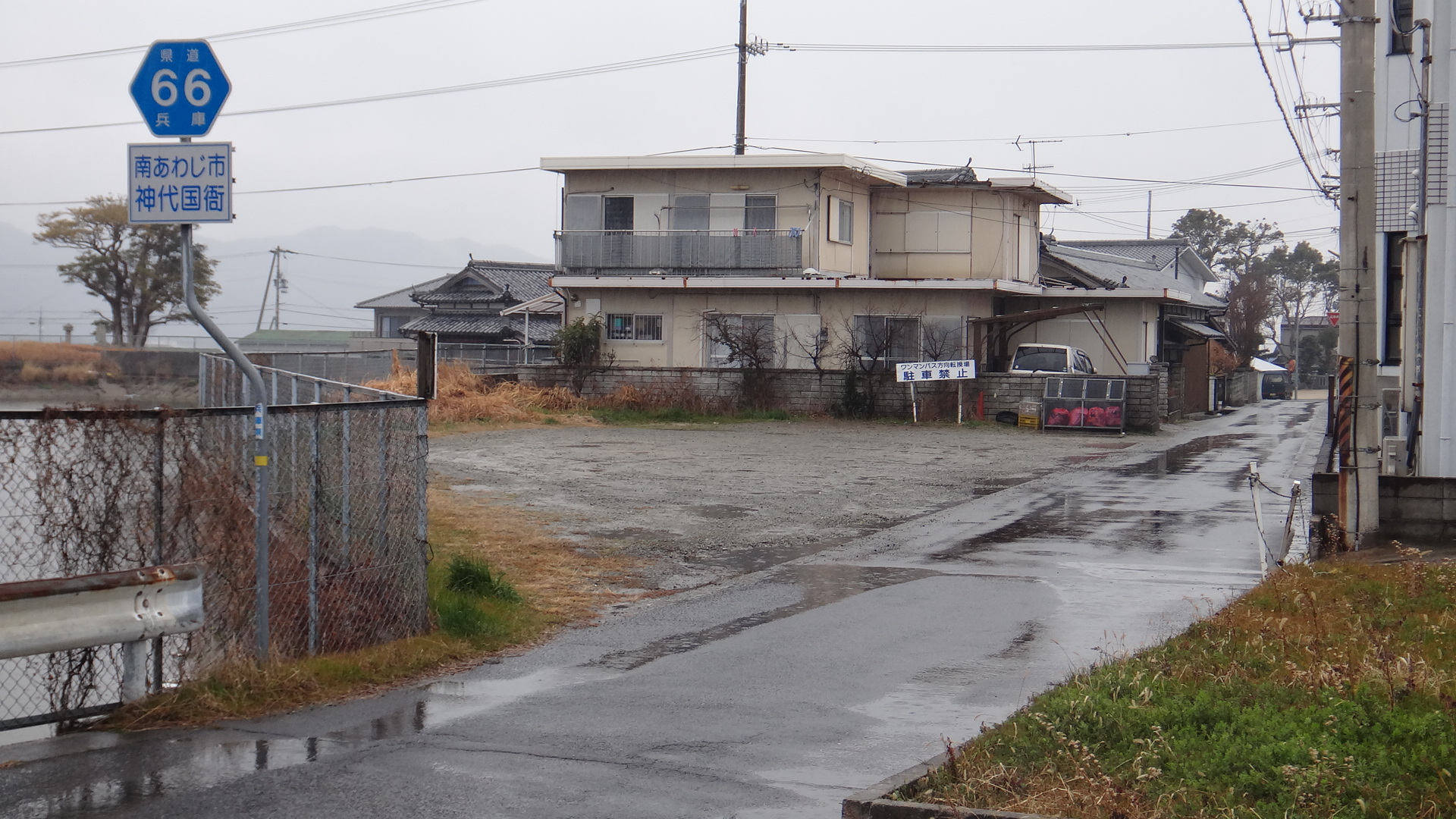 兵庫県道66号 南あわじ市神代国衙